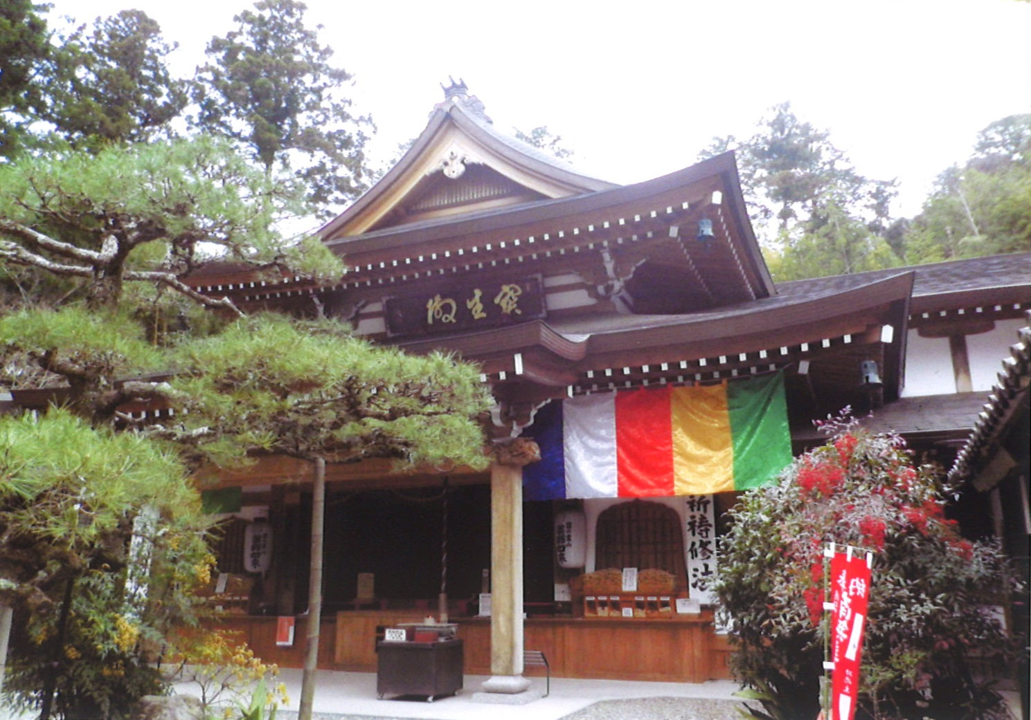 宝生殿、まずここを参拝する